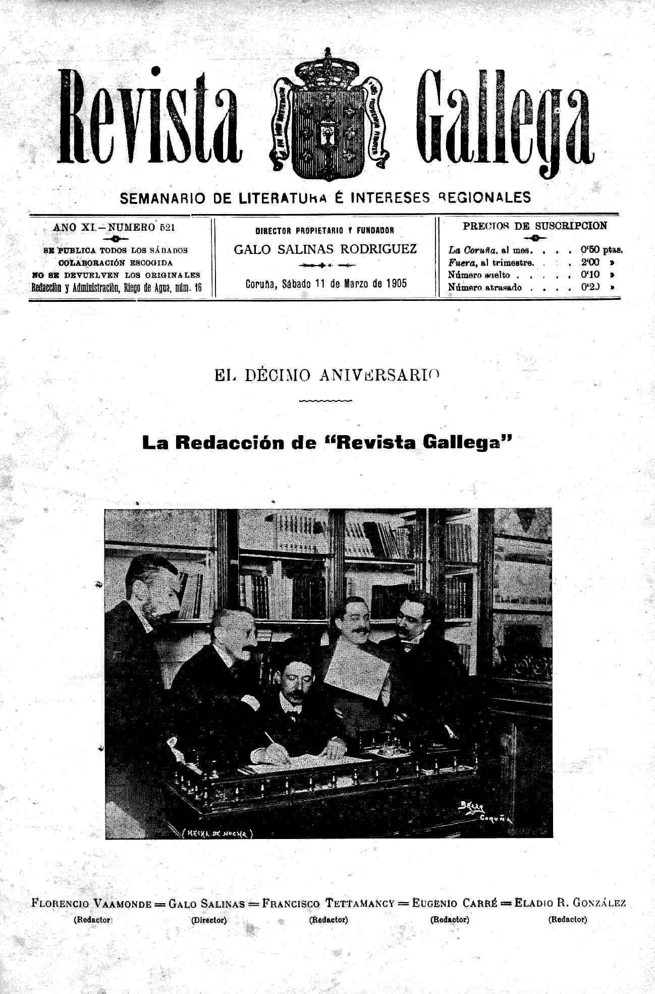 Capa do número 521 da Revista Gallega (10º aniversario) co seu consello de redacción